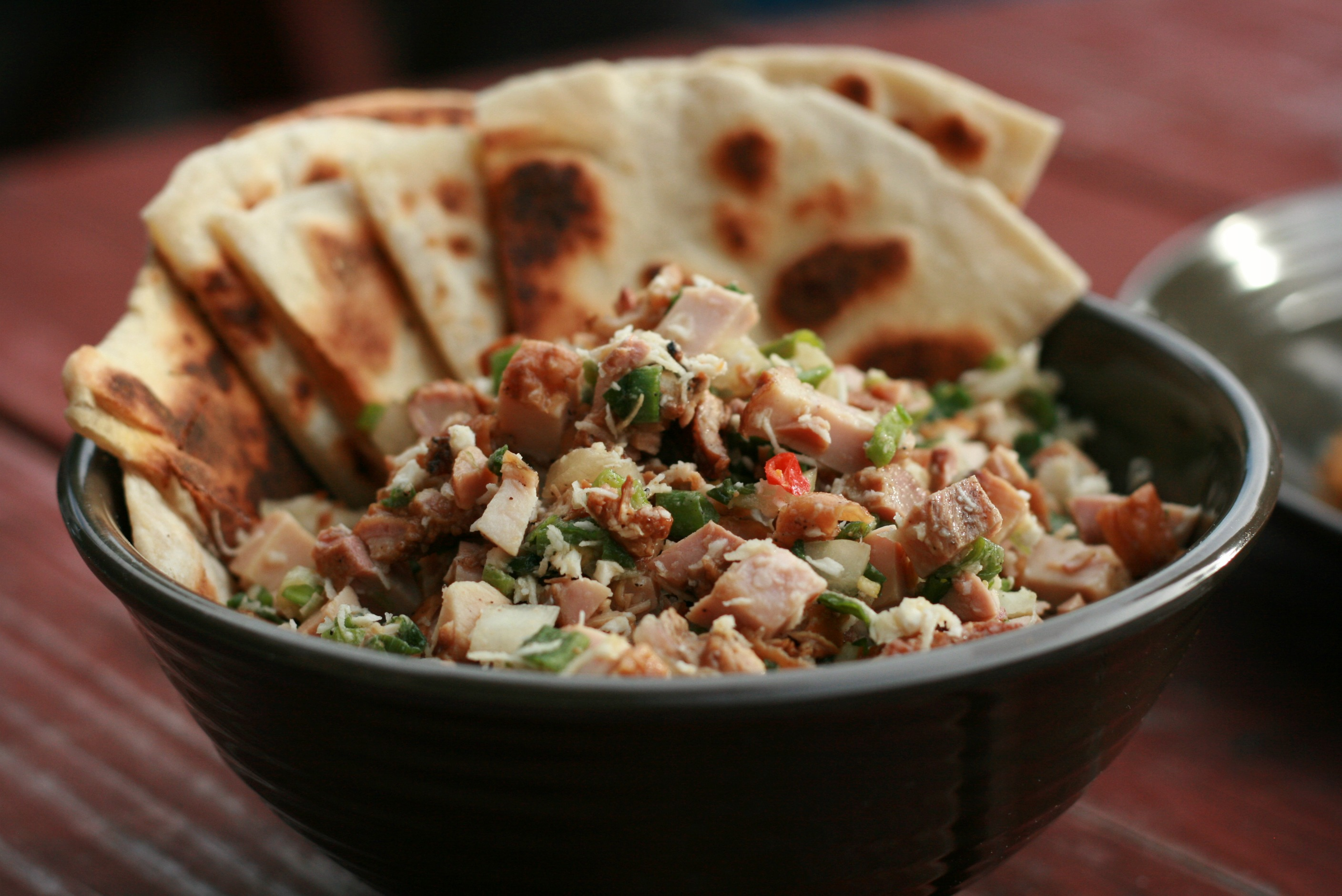 PDX671 - kelaguen mannok w/titiyas